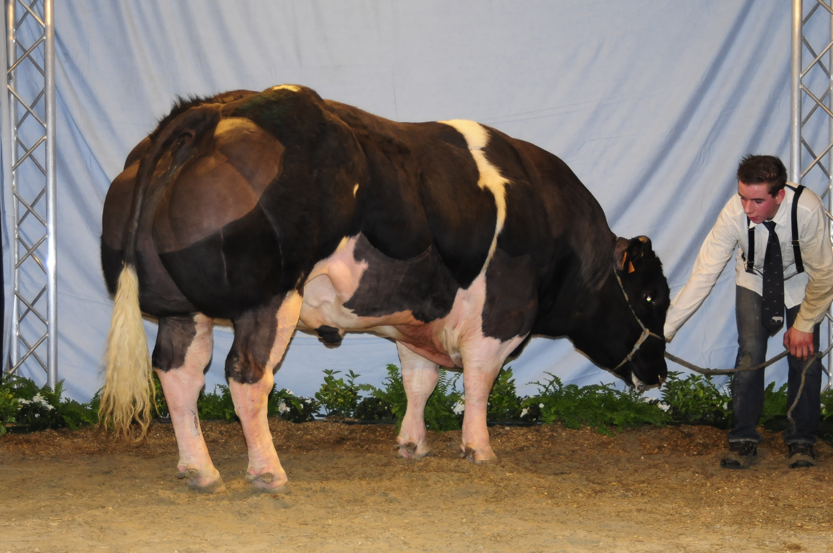 Vleesvee prijskamp - Agriflanders 2009